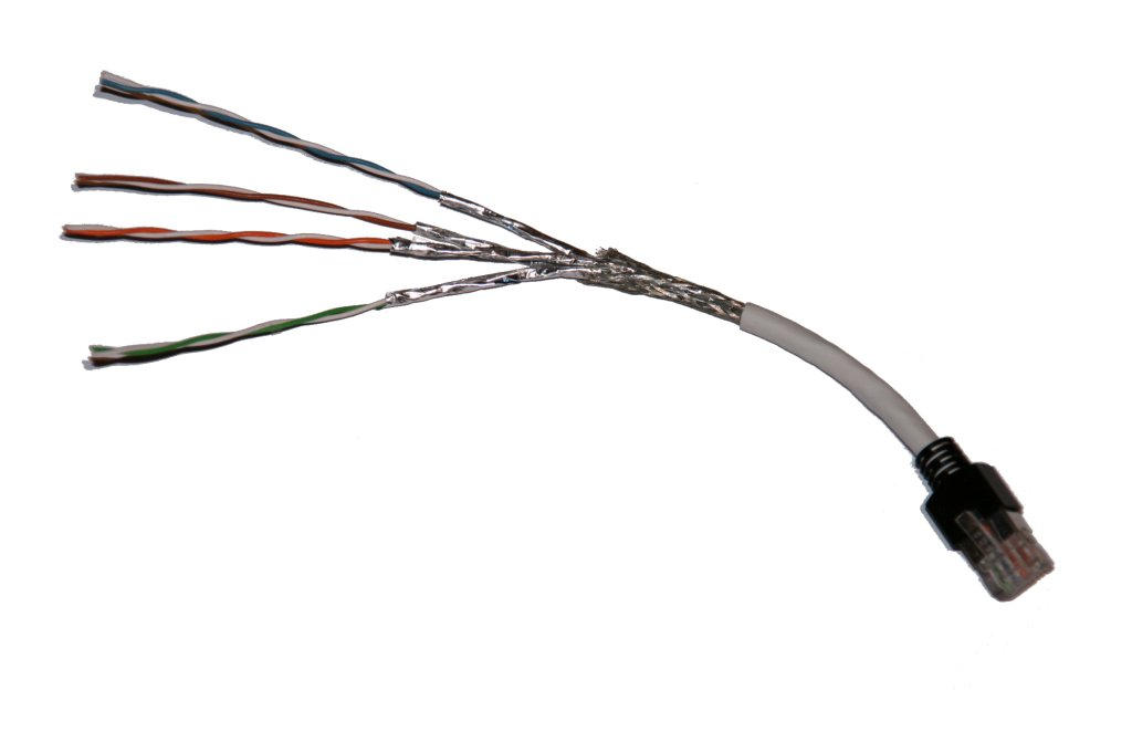 Screened/Foiled Twisted Pair Kabel